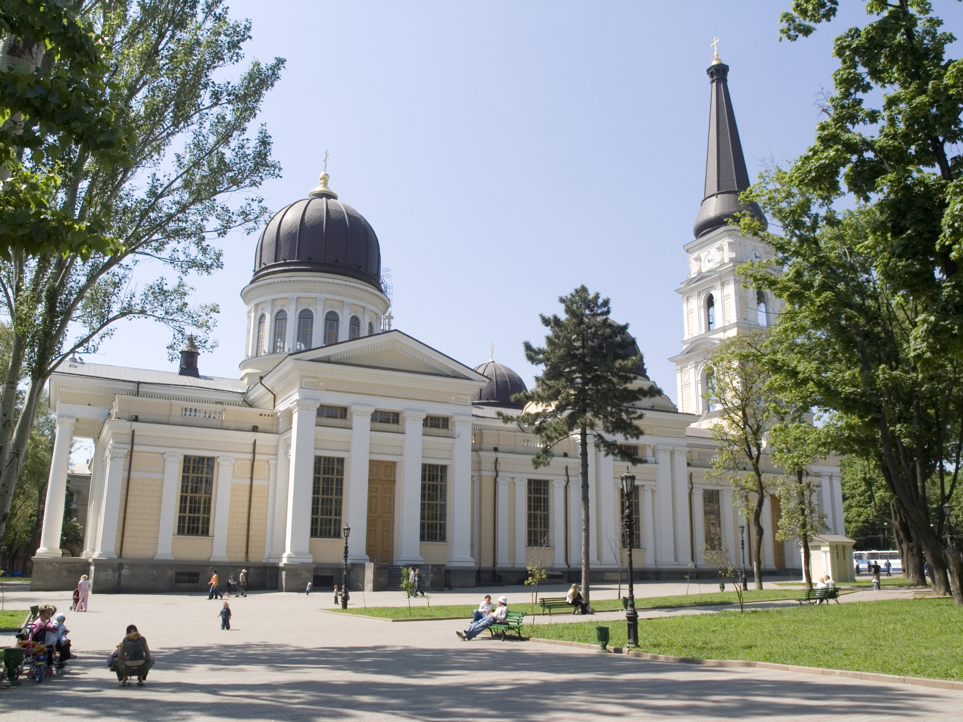 Україна, Одеса - Будівля Спасо-Преображенського собору, де поховано видатних людей м. Одеси й Південного регіону України – князя М.С. Воронцова та княгиню Є.К. Воронцову